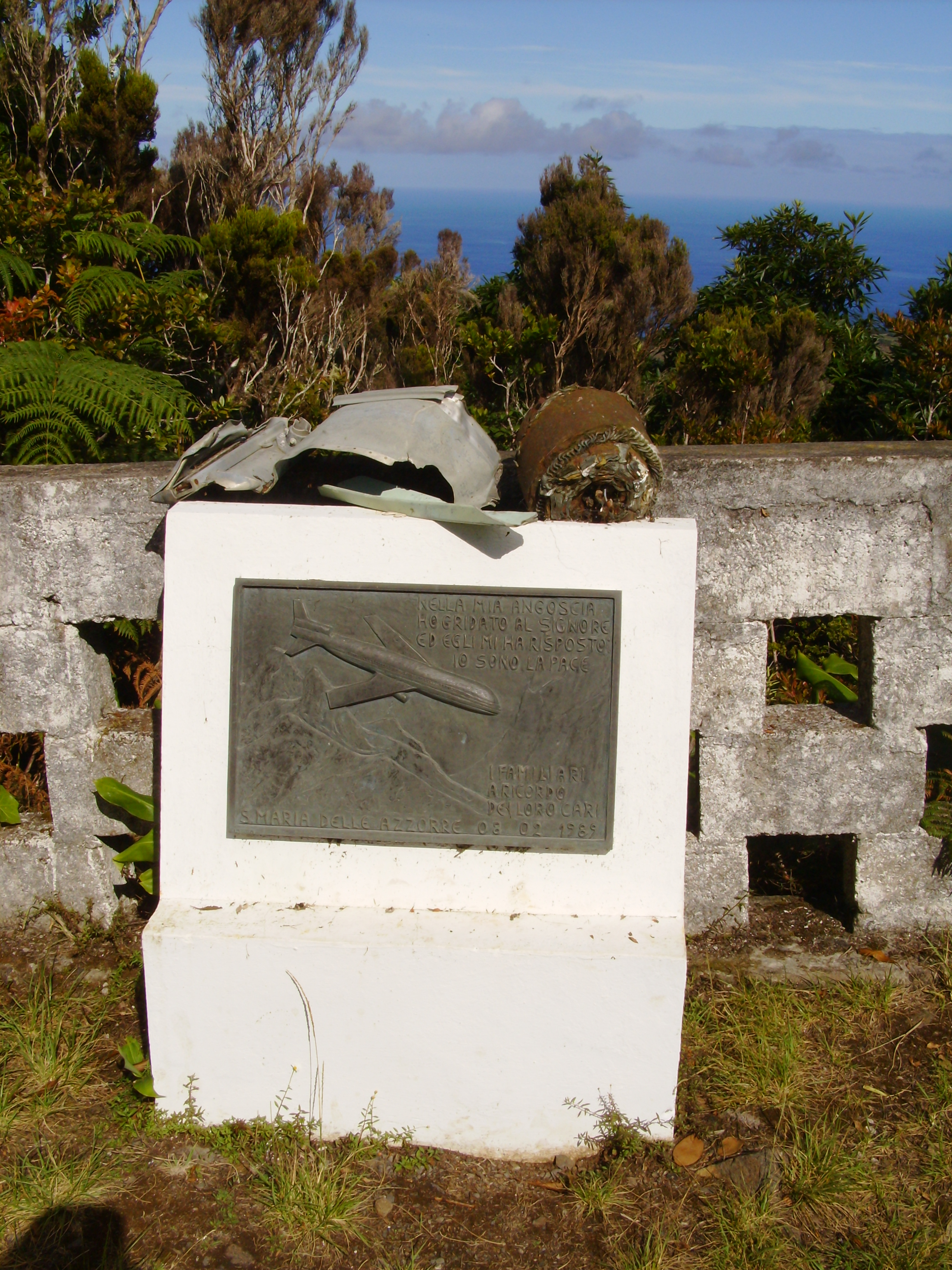 Pico Alto, concelho de Vila do Porto, ilha de Santa Maria, Açores: monumento aos mortos do vôo 1851.